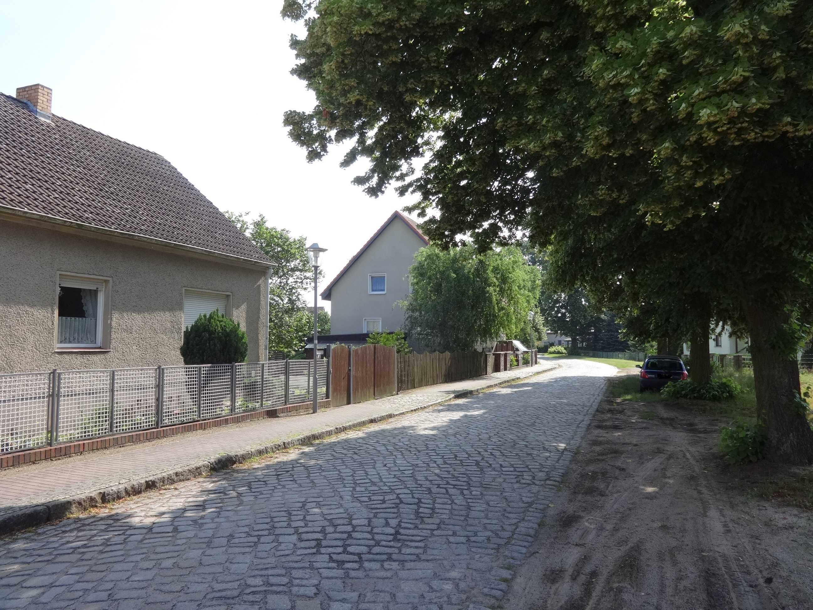 Impression aus Freidorf, ein Ortsteil der Gemeinde Halbe im Landkreis Dahme-Spreewald in Brandenburg